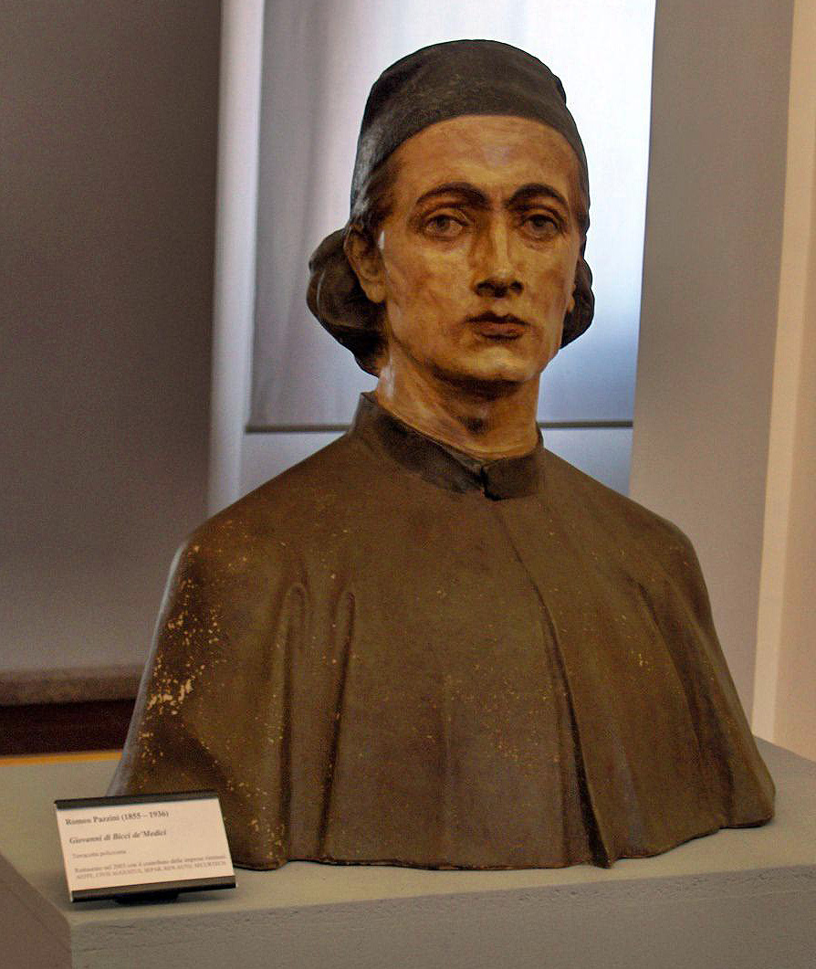 busto in terracotta policroma. Museo della città di Rimini.